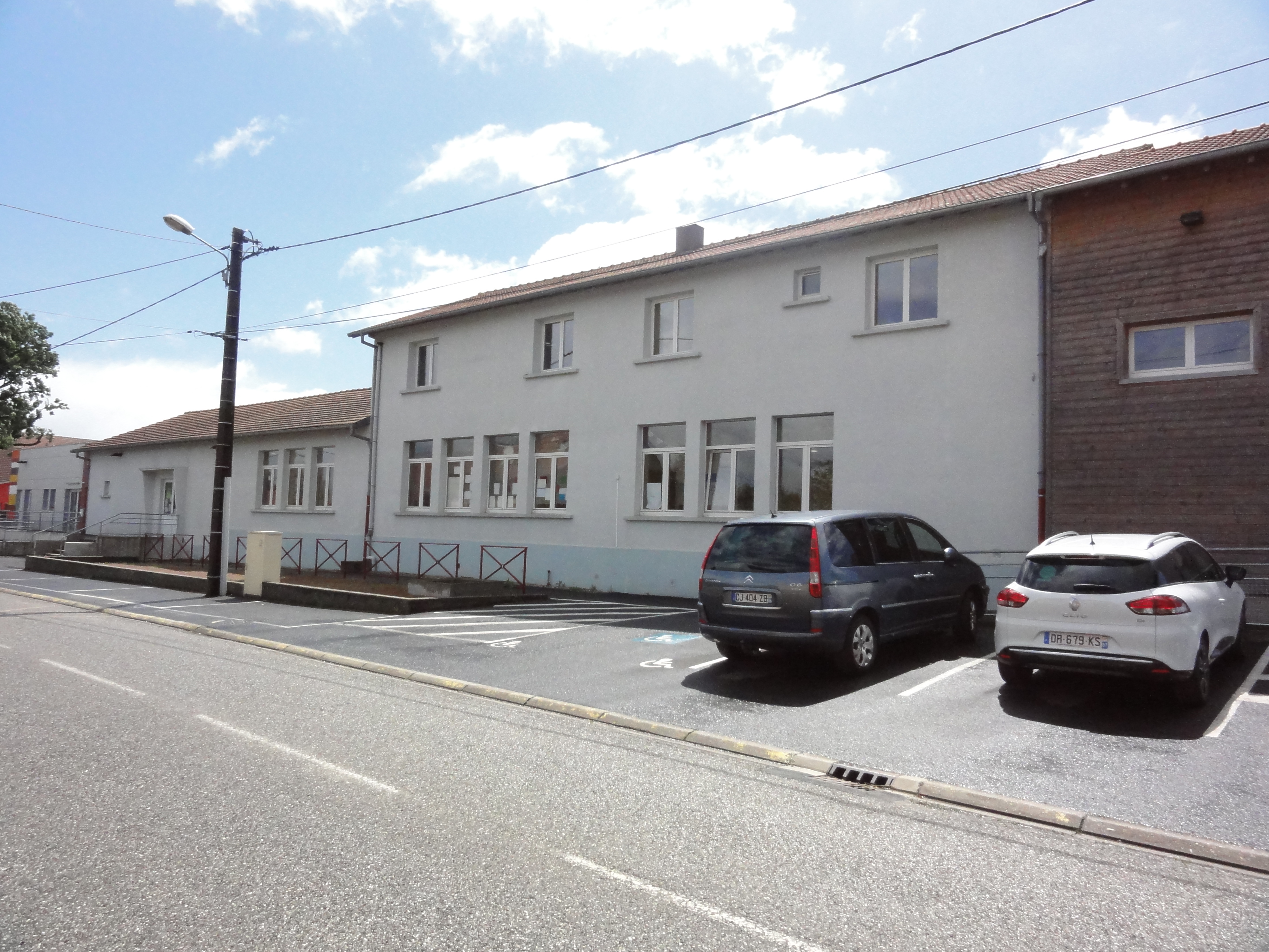 Brouviller (Moselle) école